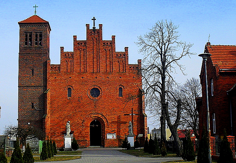 Prochowice, kościół pw. Św. Jana Chrzciciela